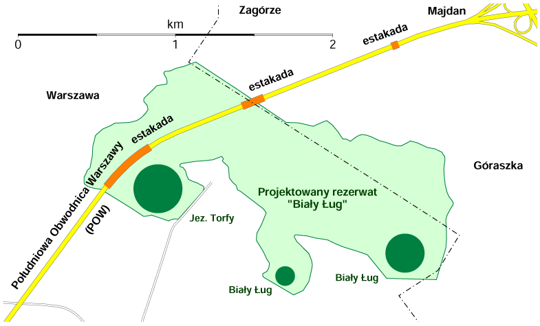 Projektowany rezerwat przyrody "Biały Ług" oraz planowany przebieg Południowej Obwodnicy Warszawy (POW) w tym rejonie. Aleksandrów, Wawer, Warszawa oraz gmina Wiązowna. Granice oraz przebieg trasy są orientacyjne, mogą być niedokładne lub nieaktualne.